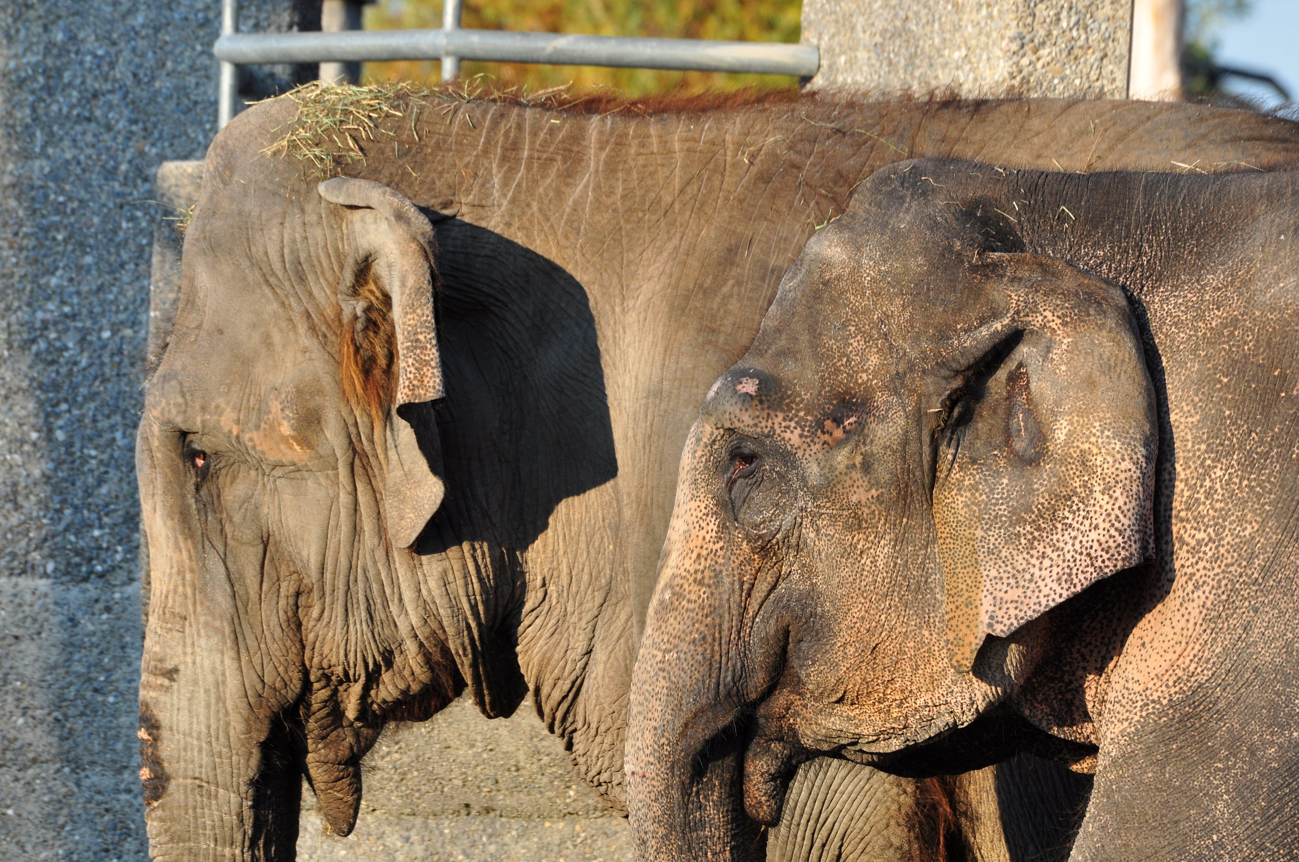 Elephas maximus, Knie's Kinderzoo in Rapperswil (Switzerland)